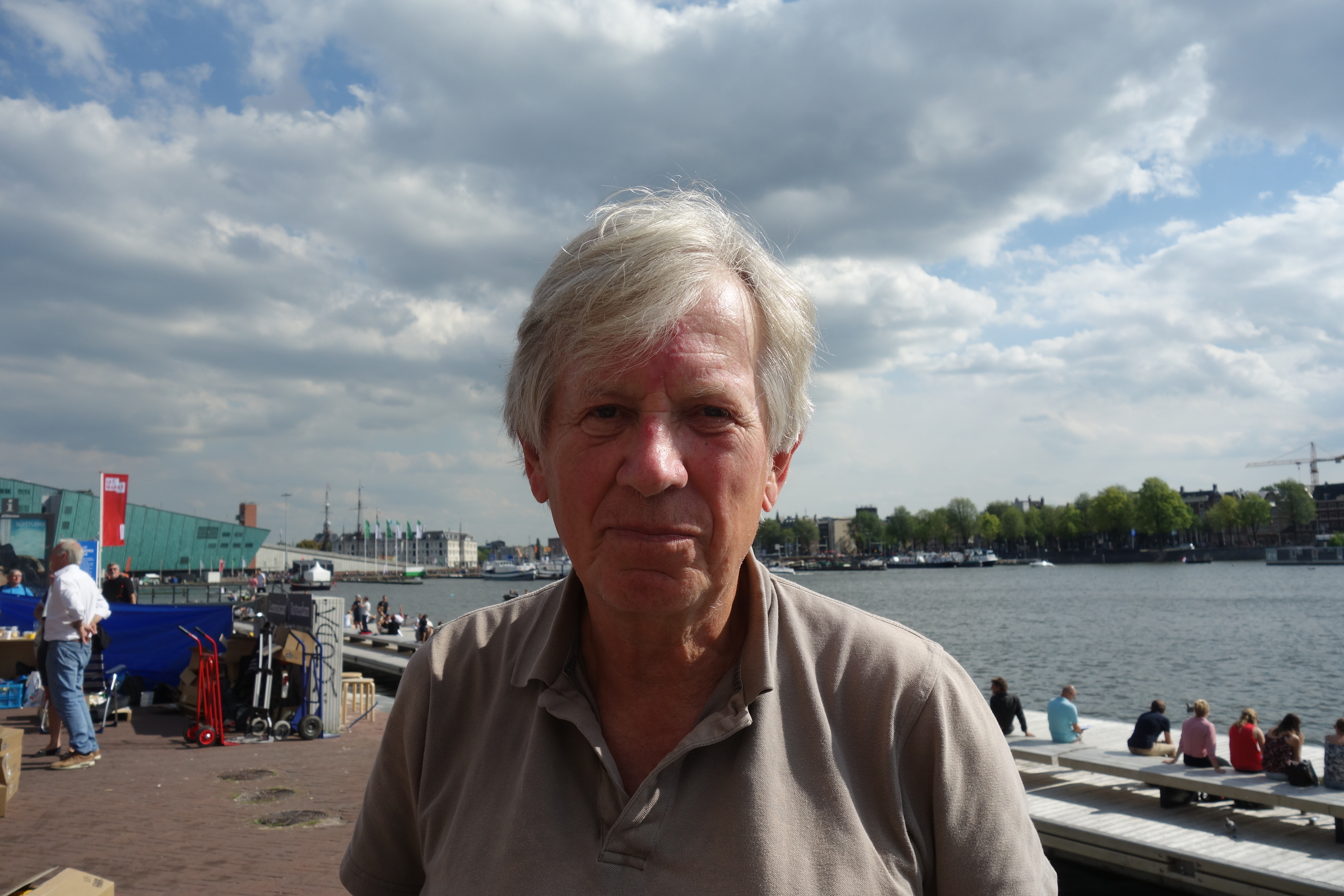 Hans Achterhuis (Amsterdam, 2017)